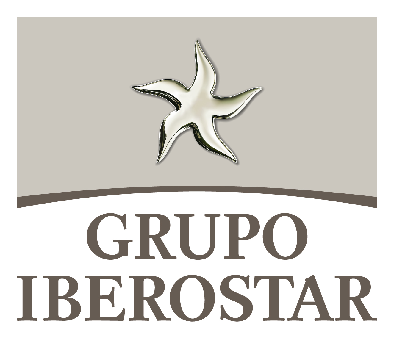 The GRUPO IBEROSTAR brand represents the entire company. The logo is constructed using Pradell typography in upper case. The combination logo uses a centred composition in which the symbol is framed by a background in Pantone 401.